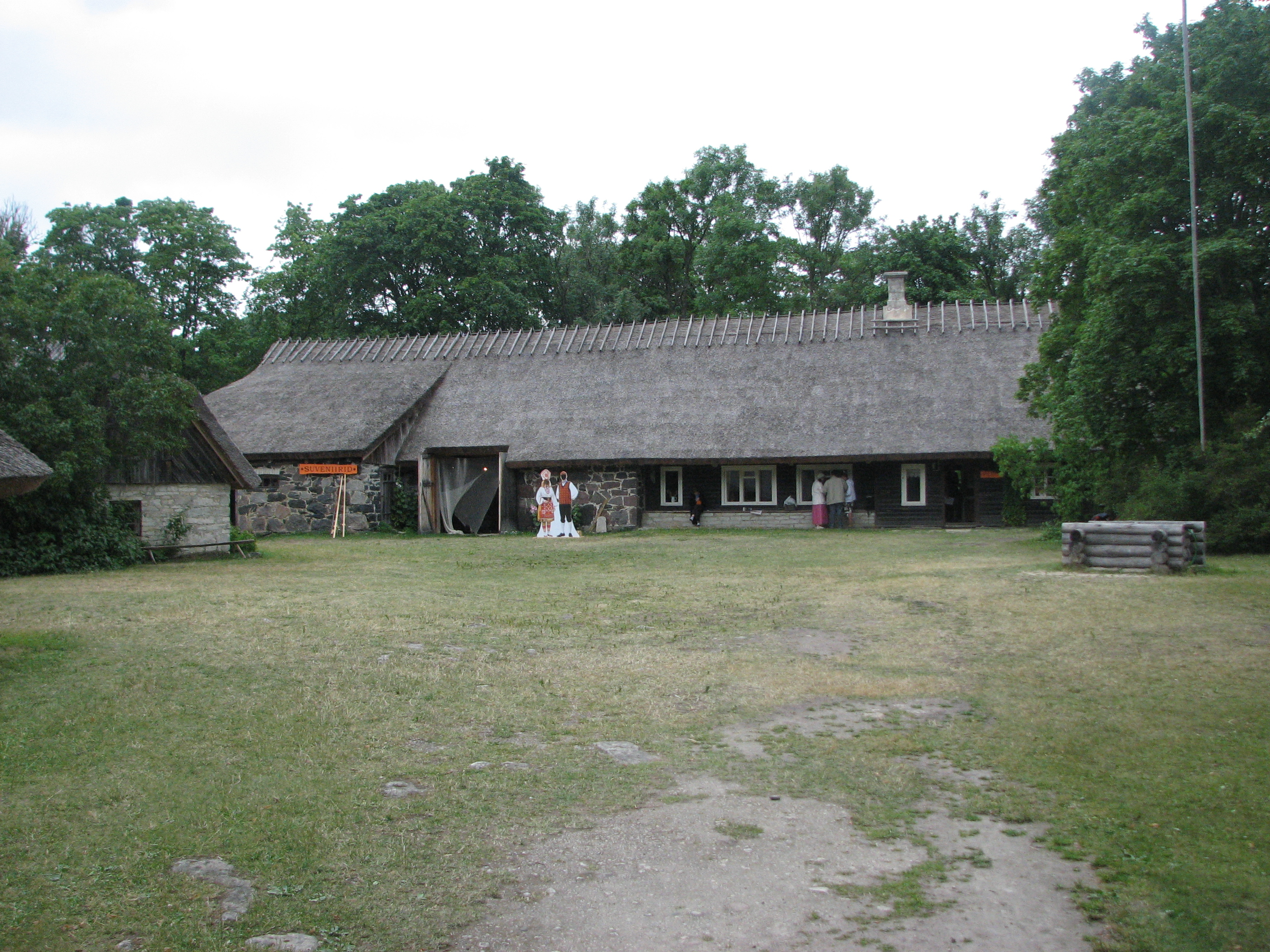 Tooma talu rehielamu Koguval